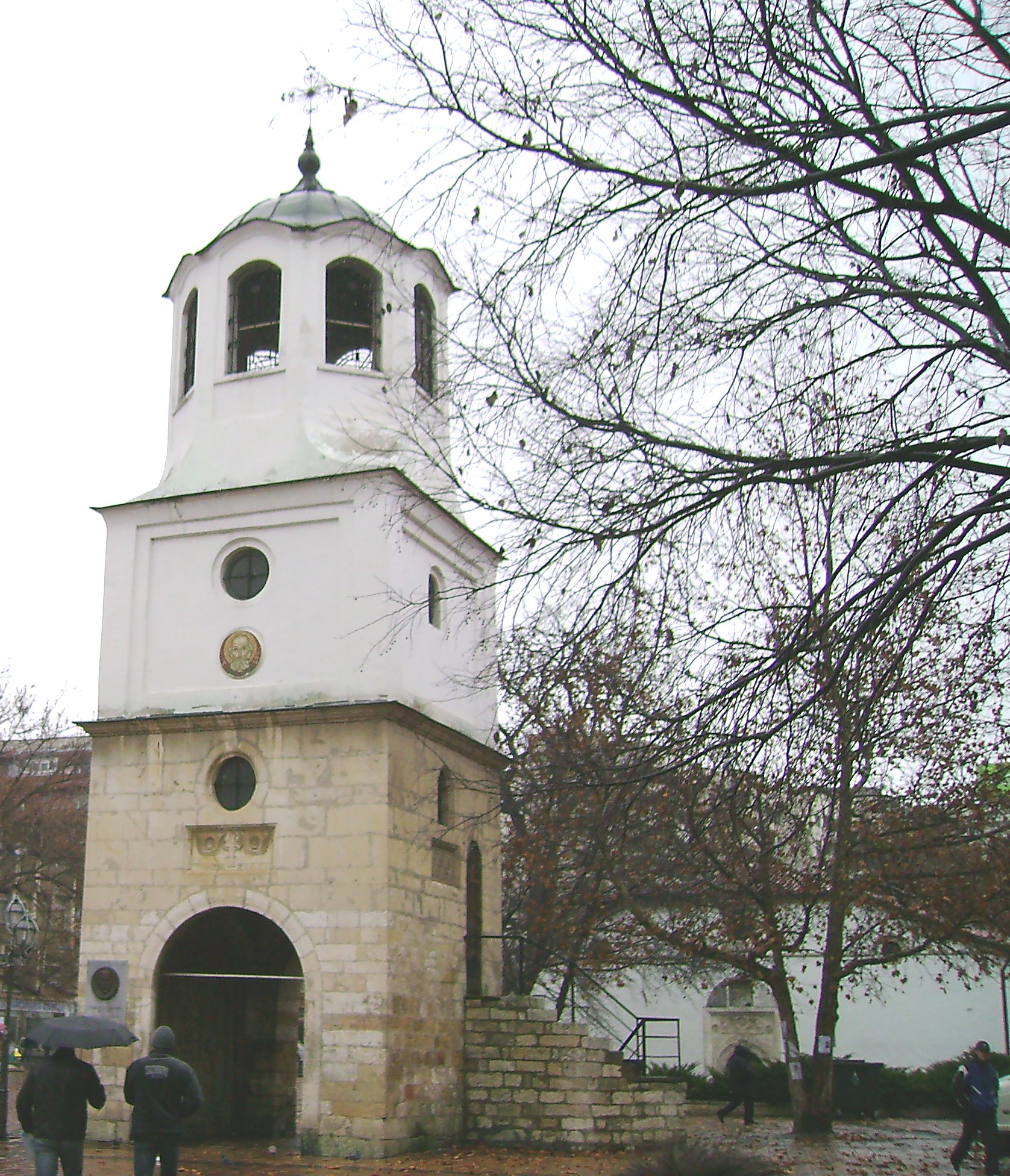 Камбанария / Bell tower